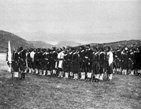 volontaires intégrés dans les troupes du Monténégro, ocotbre 1914.